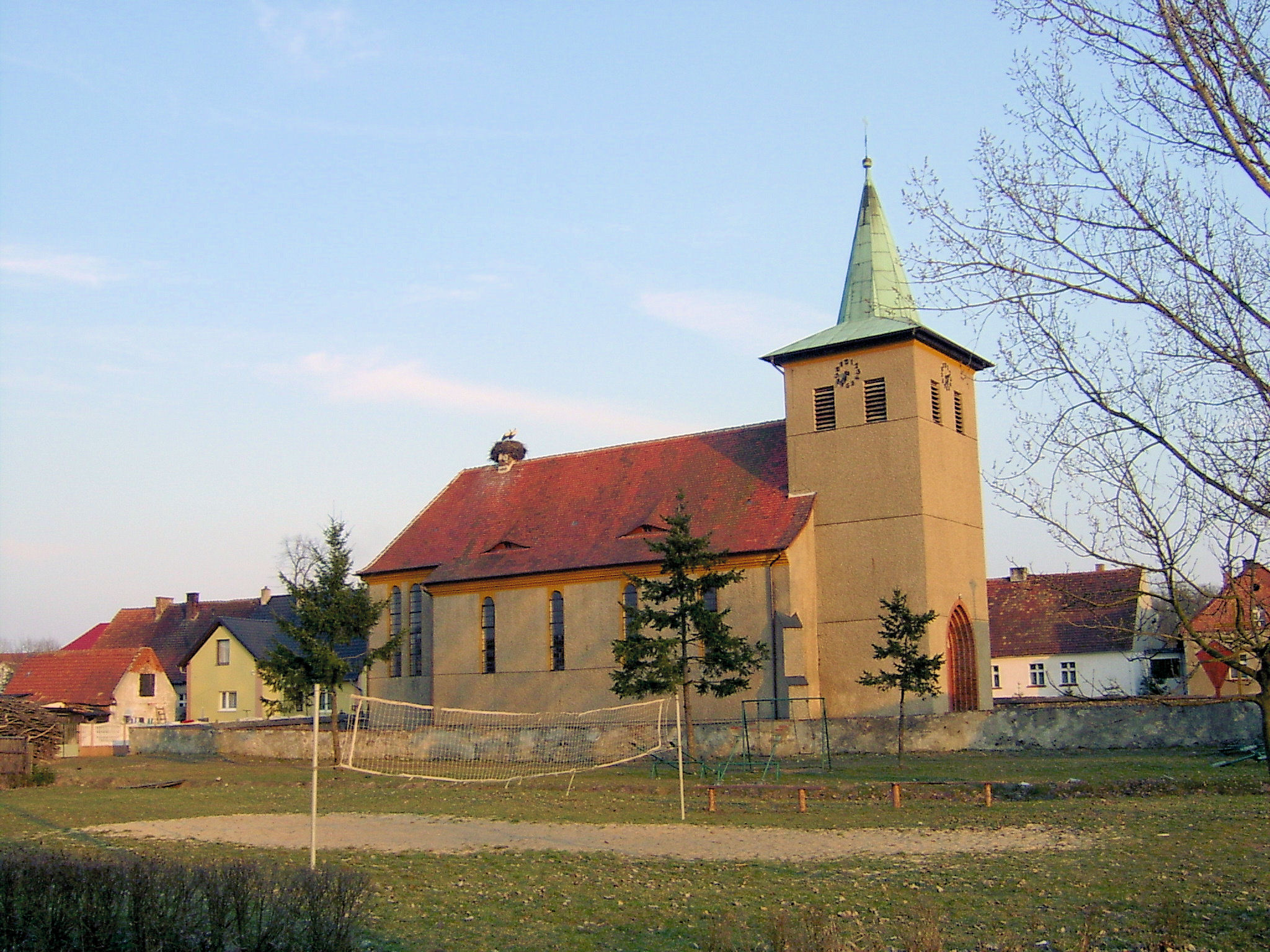 Stary Dwór kościół - gm. Trzciel - woj. lubuskie - Poland